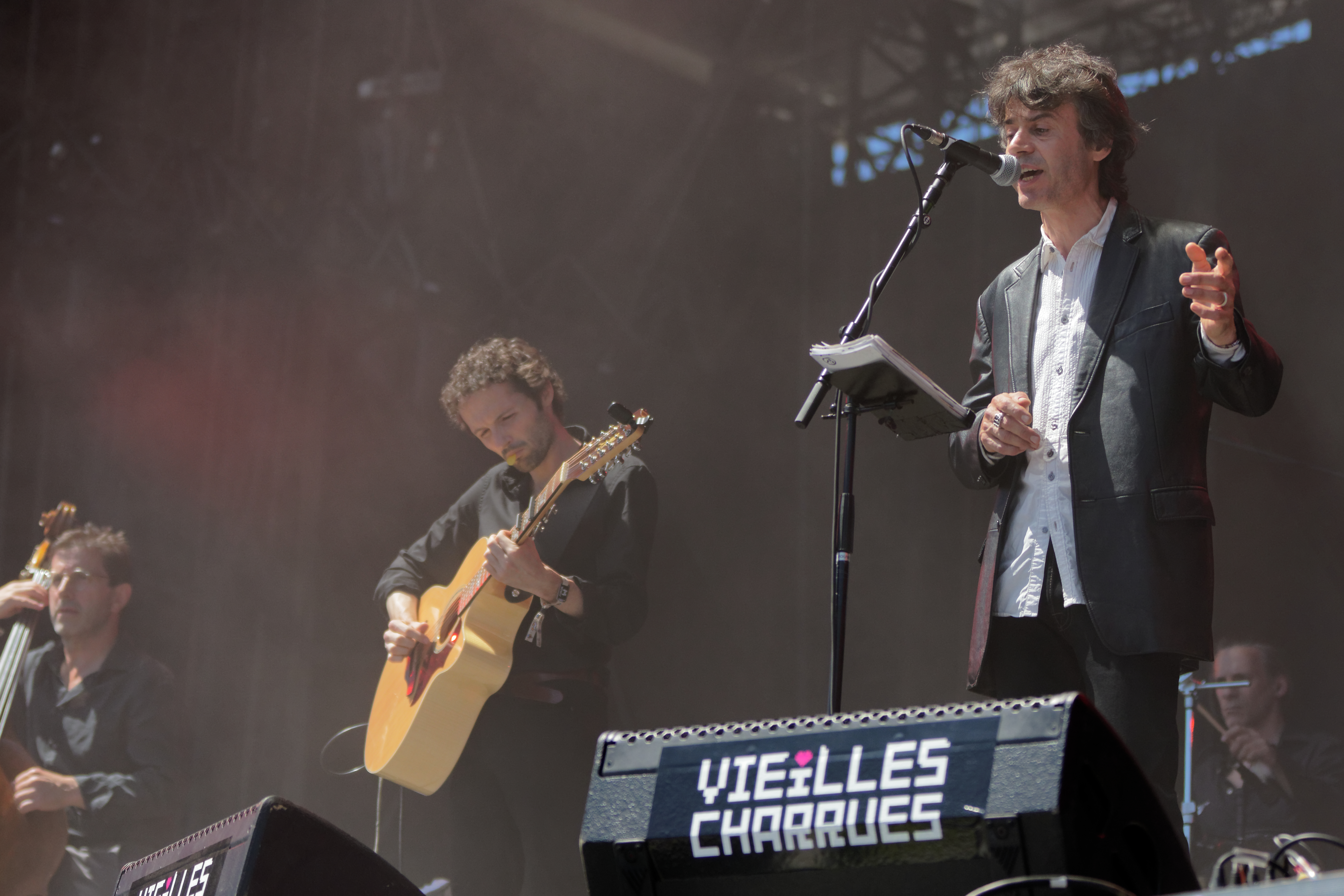 Denez Prigent en concert lors du festival des vieilles charrues 2016.